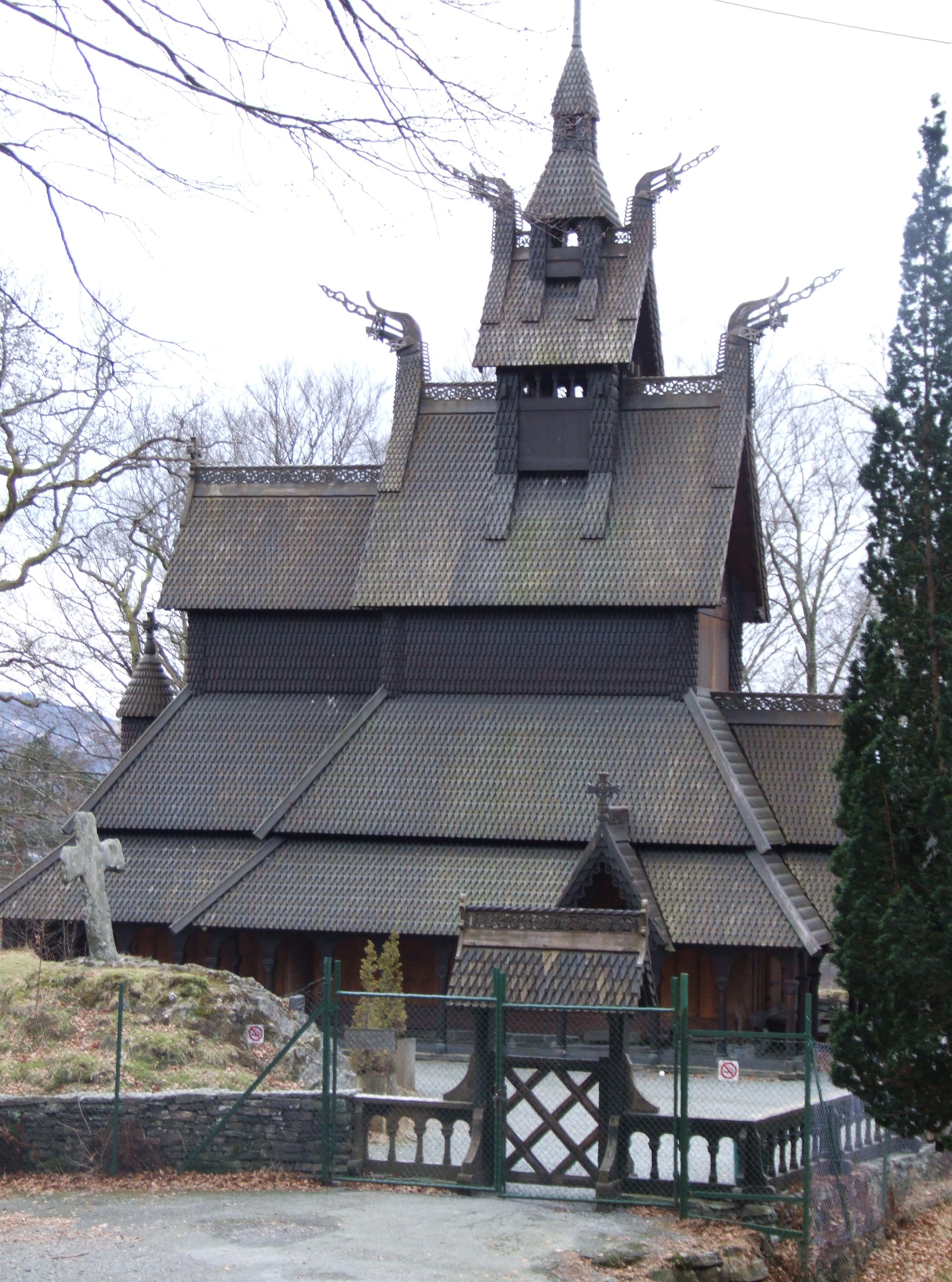 Fantoft Stabkirche in Bergen(Norway)